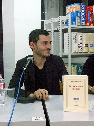 Jean-Baptiste Del Amo, Barcelona 2011